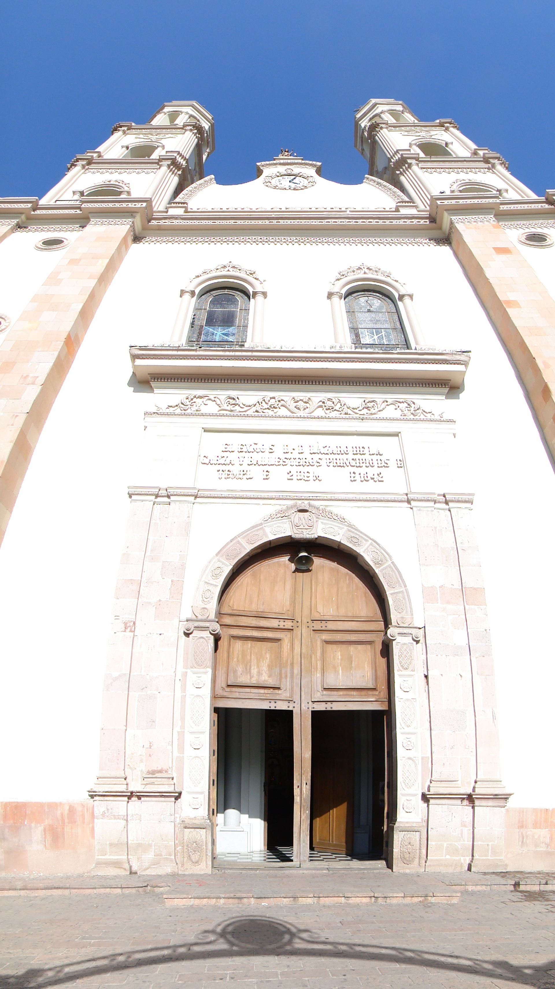 Catedral de Culiacán.